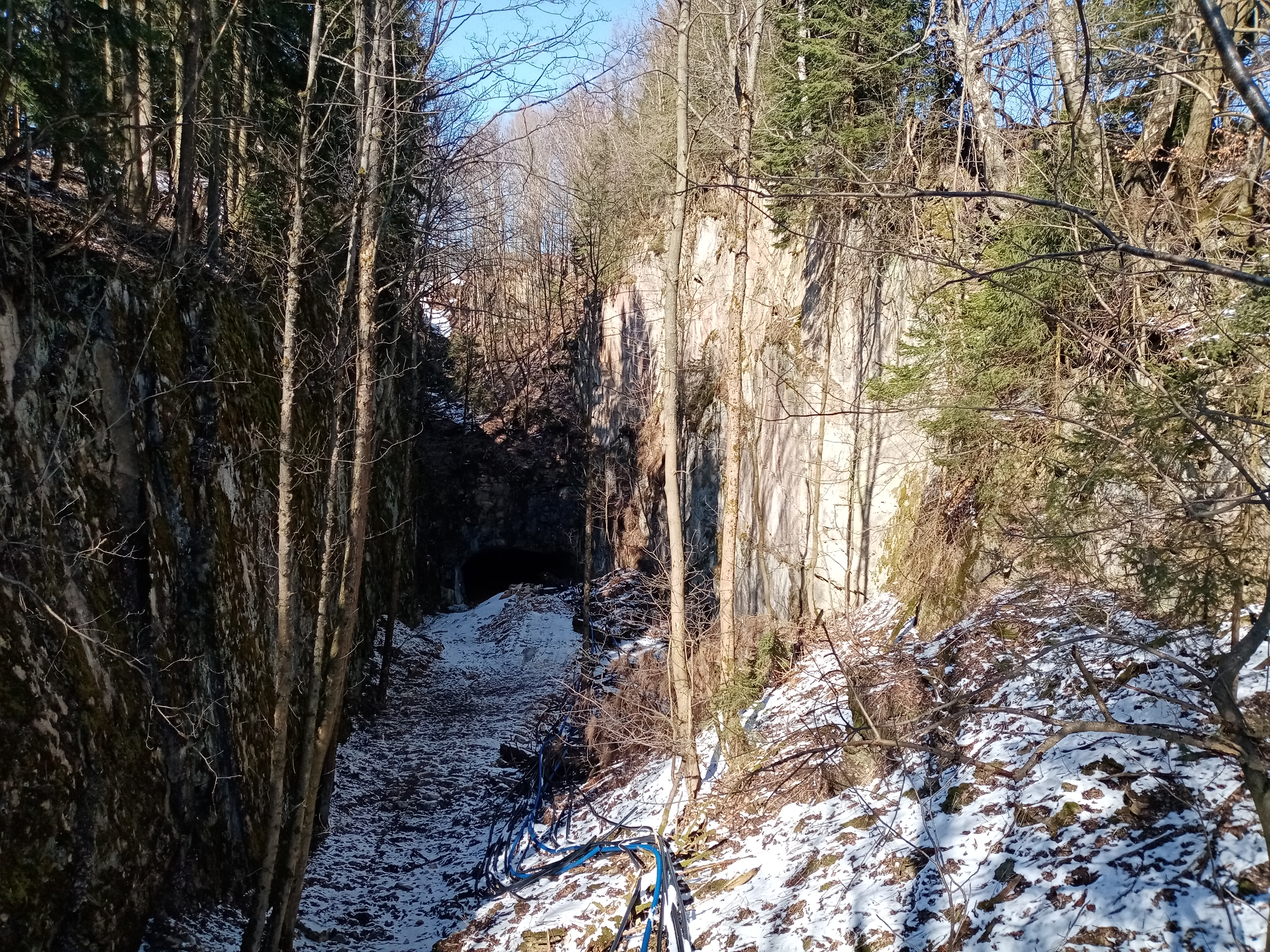 V Horních Albeřicích.